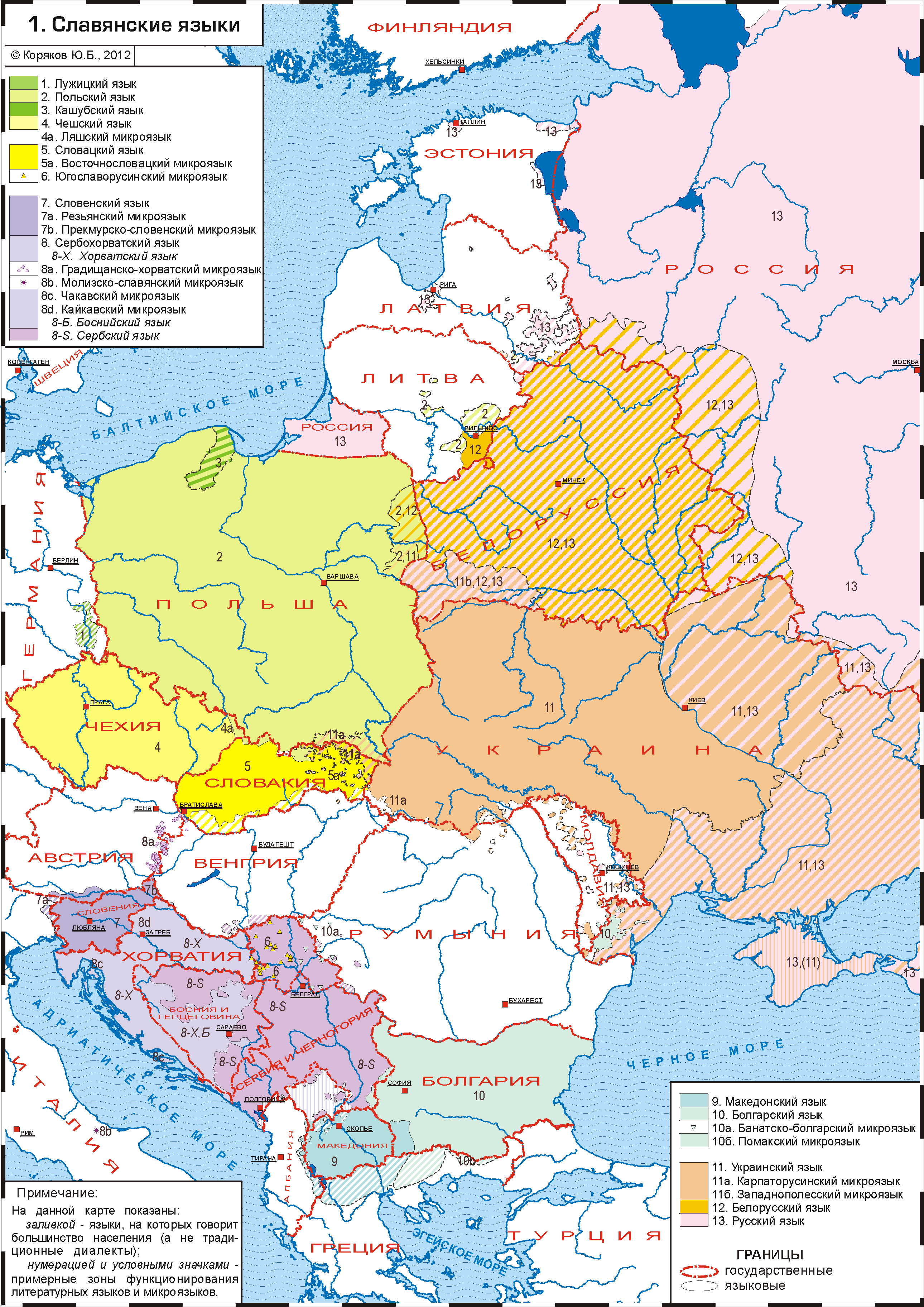 Карта из книги "Языки мира: Славянские языки. М., 2005" (1 форзац) с добавлением цвета.